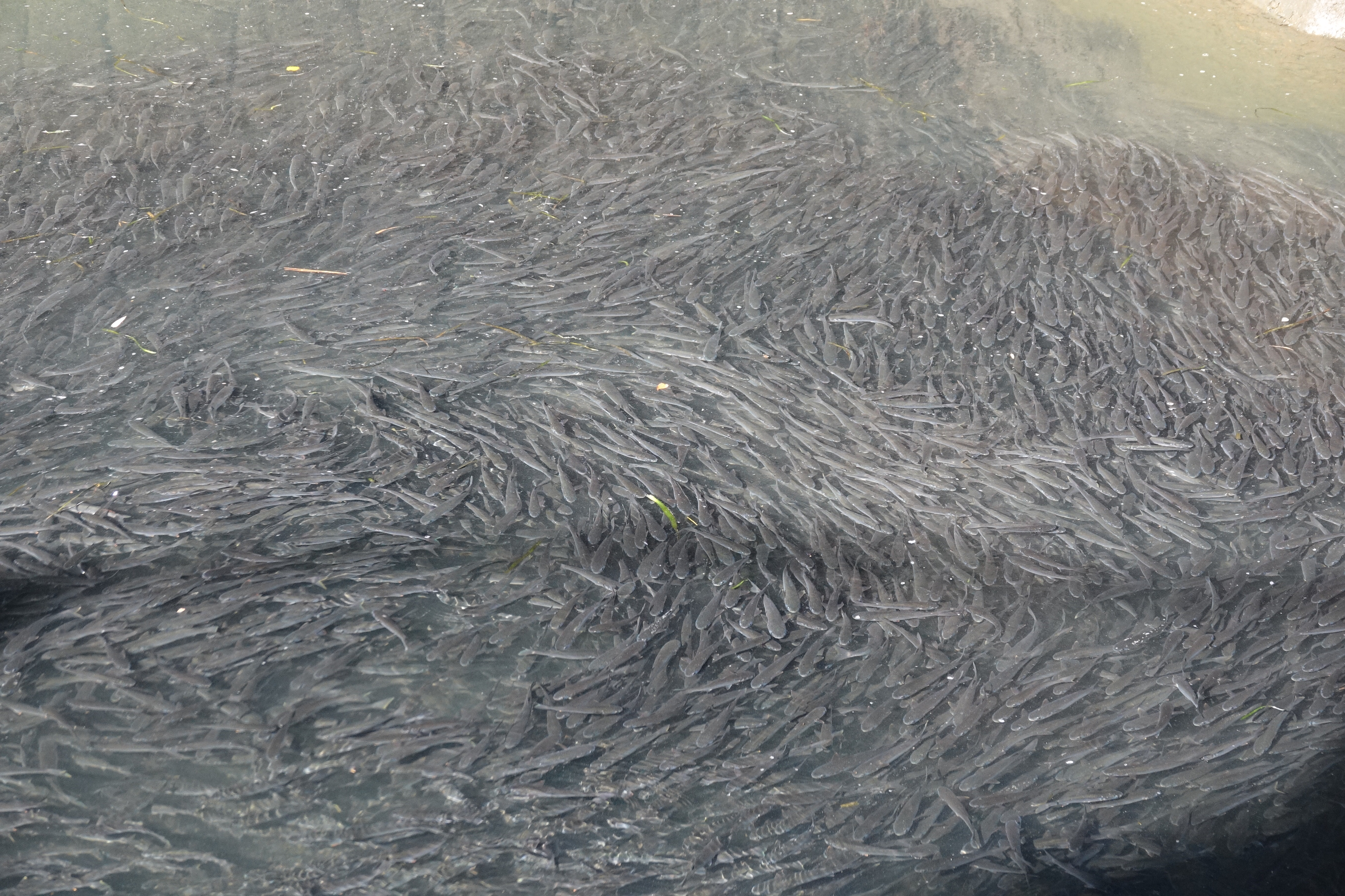 ボラの群れ 名古屋市黒川